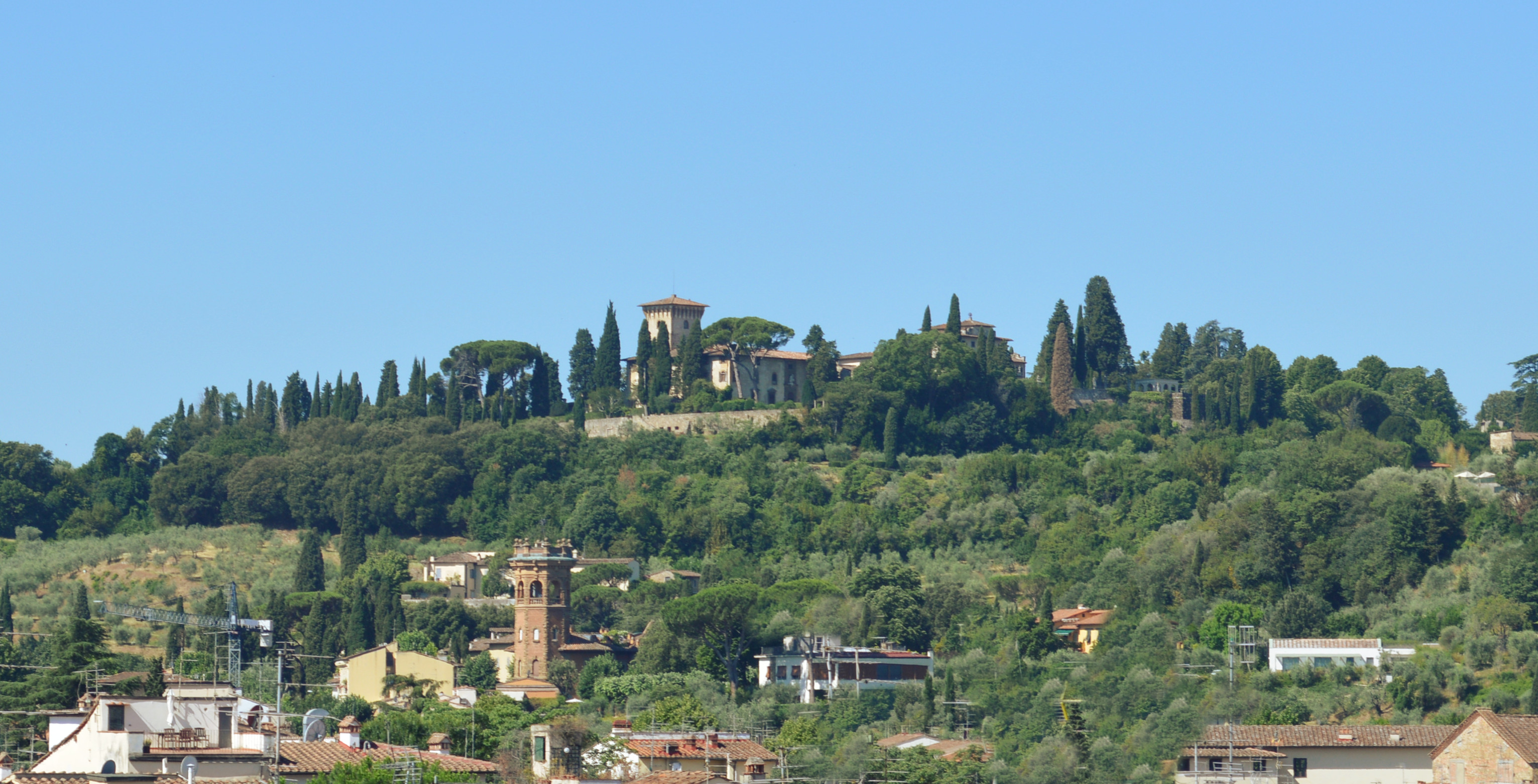 La collina di Bellosguardo a Firenze. Si notino le torri della Villa di Bellosguardo (in alto, al centro) e della Villa Pagani (in basso, al centro).